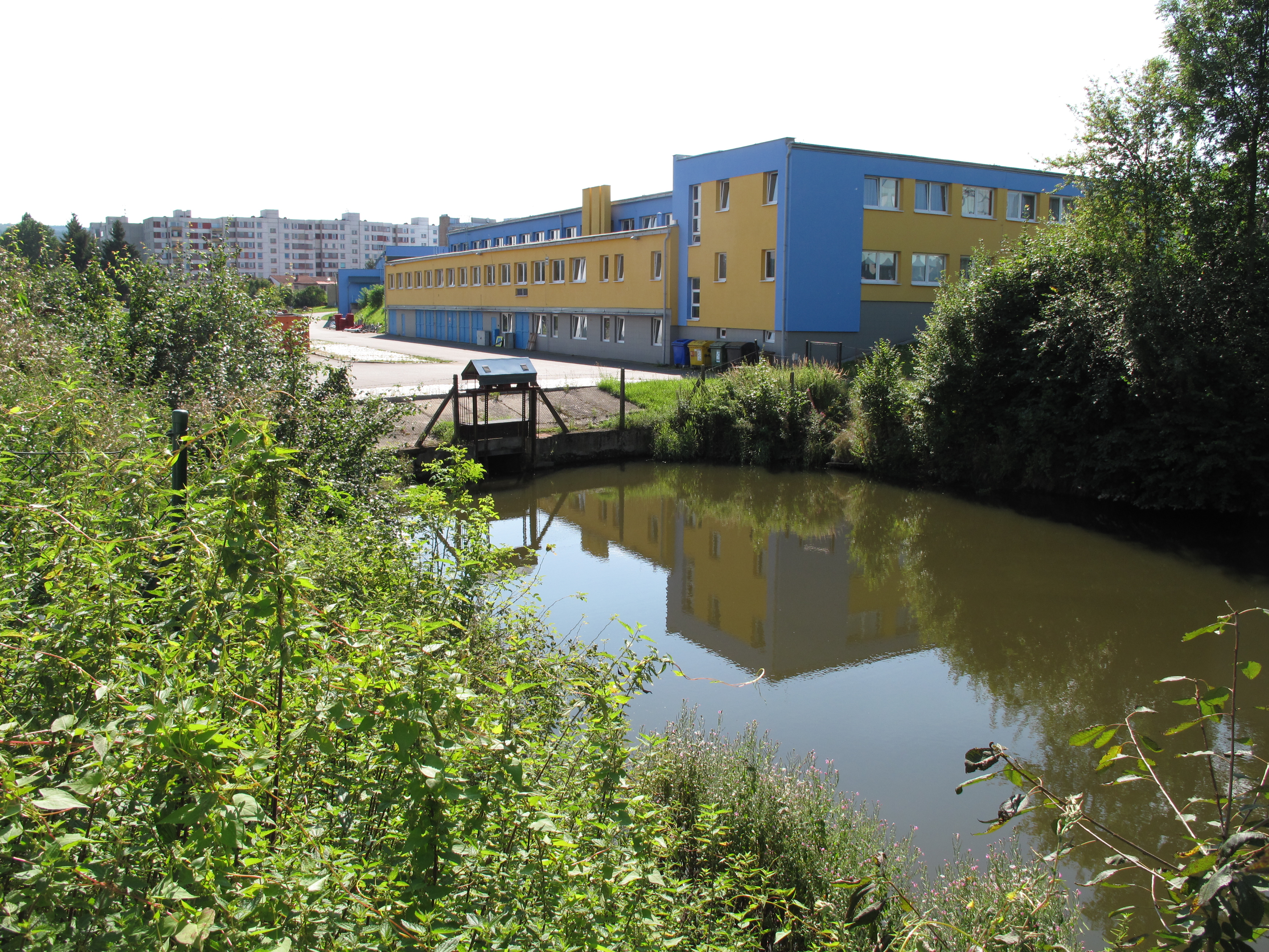 Pěník. Písek, Česká republika.